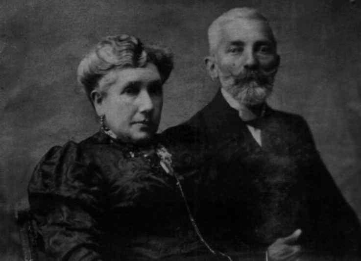 Fernando Belloso Lucas y Victoria Rodriguez